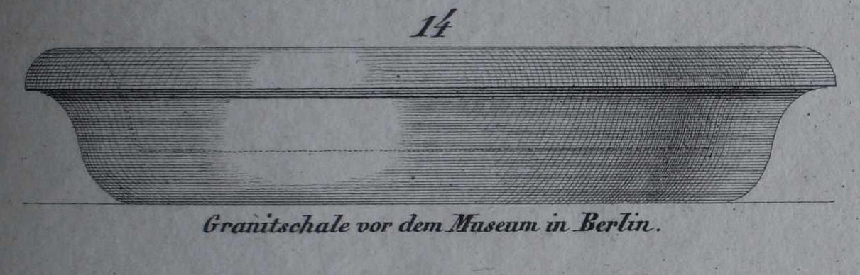 Granitschale